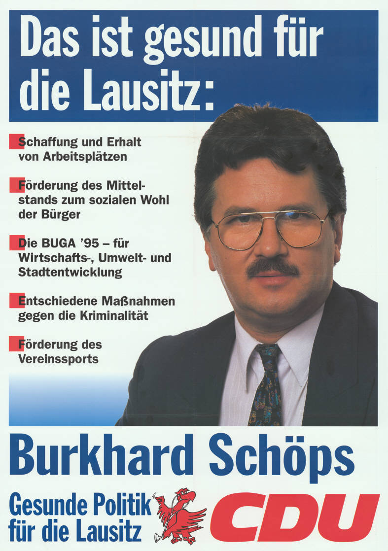 Das ist gesund für die Lausitz: . Schaffung und Erhalt von Arbeitsplätzen . Förderung des Mittelstands zum sozialen Wohl der Bürger . Die BUGA '95 - für Wirtschafts-, Umwelt- und Stadtentwicklung . Entschiedene Maßnahmen gegen die Kriminalität . Förderung des Vereinssports Burkhard Schöps Gesunde Politik für die Lausitz Abbildung: Porträtfoto Plakatart: Kandidaten-/Personenplakat mit Porträt Objekt-Signatur: 10-033 : 232 Bestand: Landtagswahlplakate Brandenburg (10-033) GliederungBestand10-18: Landtagswahlplakate Brandenburg (10-033) » CDU Lizenz: KAS/ACDP 10-033 : 232 CC-BY-SA 3.0 DE